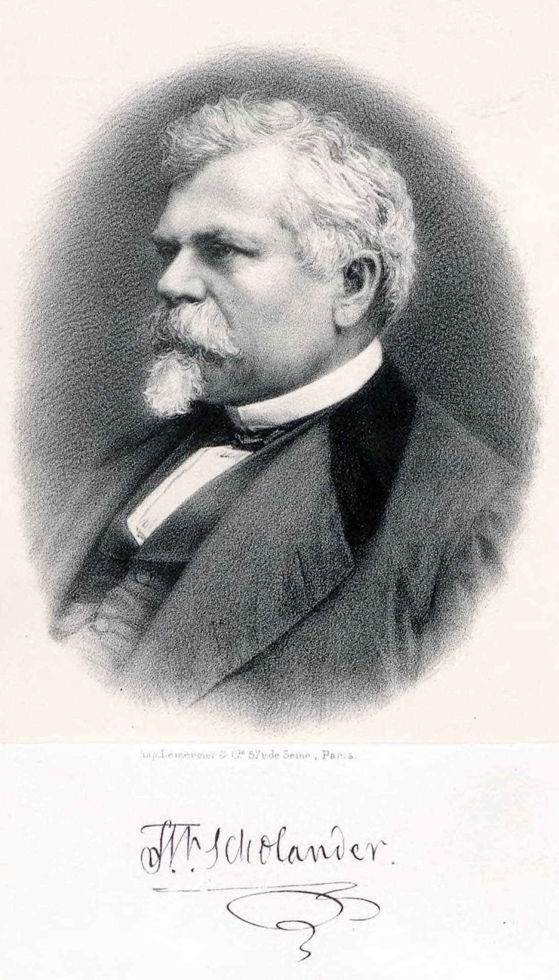 Fredrik Wilhelm Scholander. Portrait with autograph